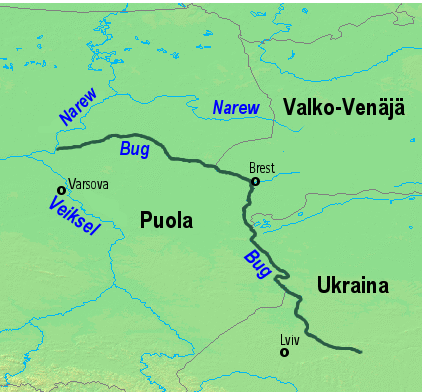 Bug joen reitti Bug joen pääuoman reitti Ukrainassa, Valko-Venäjällä ja Puolassa (suomeksi). Route of the Western Bug river (in Finnish).